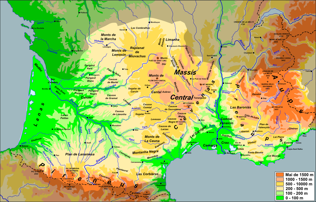 Topografia d'Occitània.